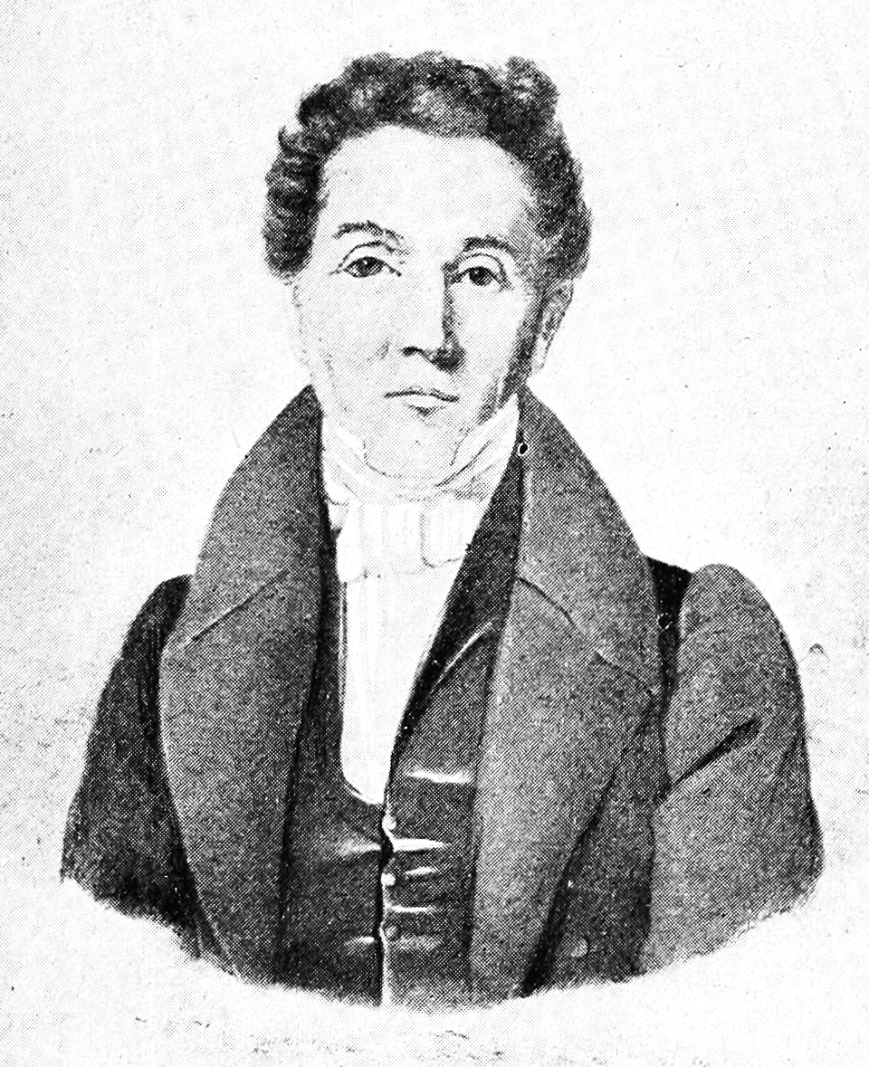 George Samuel Perrottet around 1834